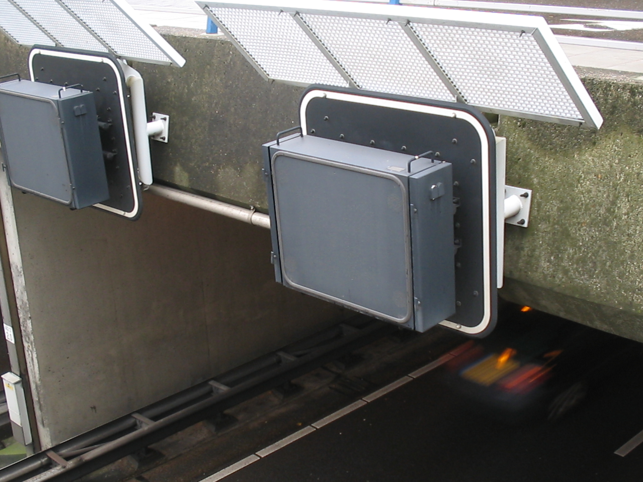 matrixborden, Den Haag, Netherlands, 21 oktober 2005